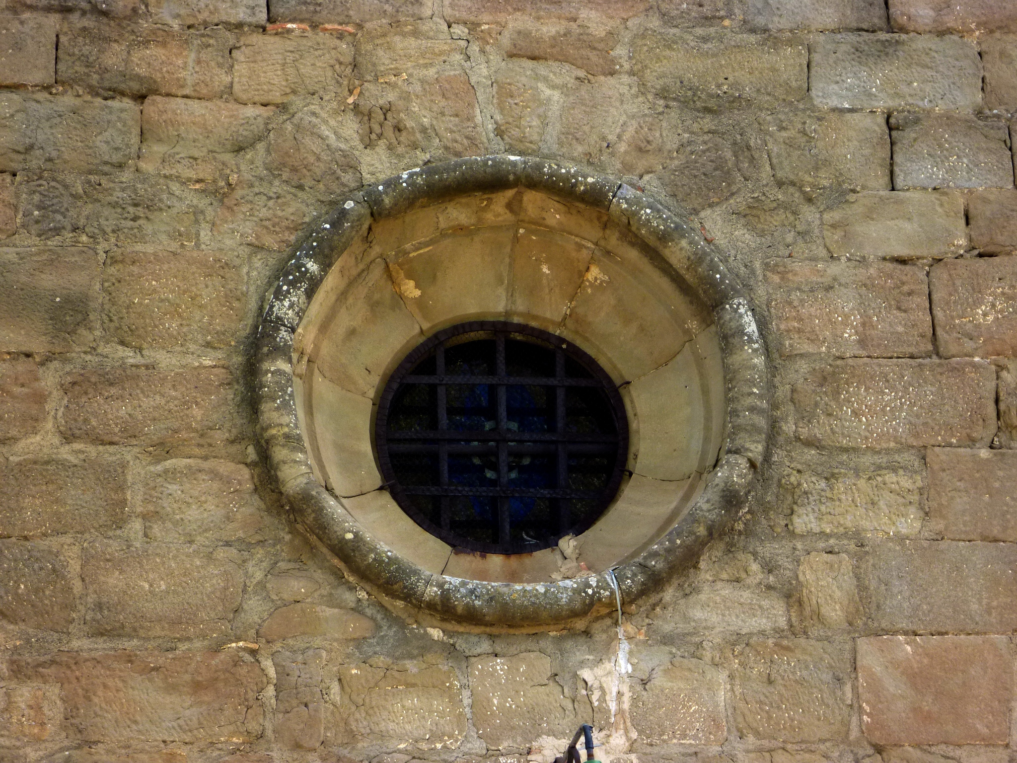 Església parroquial de Sant Andreu de Clarà (Castellar de la Ribera): ócul